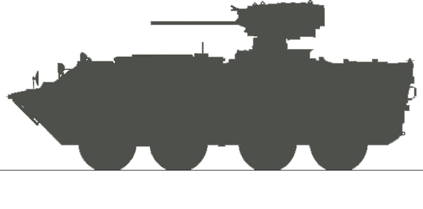 Силует бронетранспортера моделі 4 -БТР-4 "Буцефал" з гарматним модулем "Гром". Машина та озброєння повністю українського виробництва.